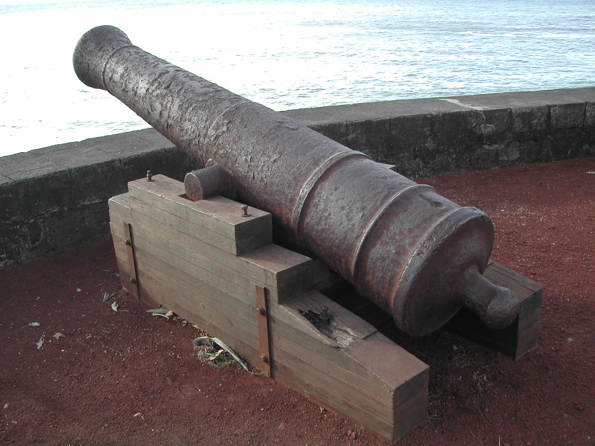 Un canon sur le Barachois de Saint-Denis